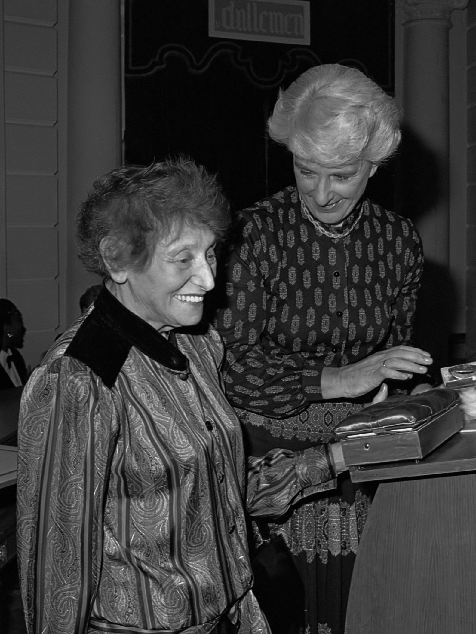 Anna Bynprijs voor Josepha Mendels; Josepha Mendels neemt prijs in ontvangst van Til Gardeniers. 8 november 1986